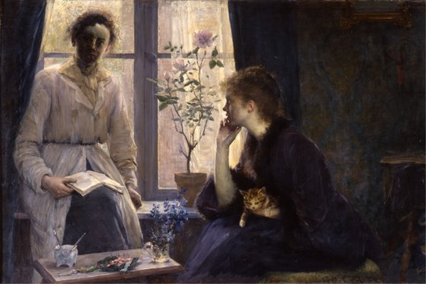 Il tè delle cinque